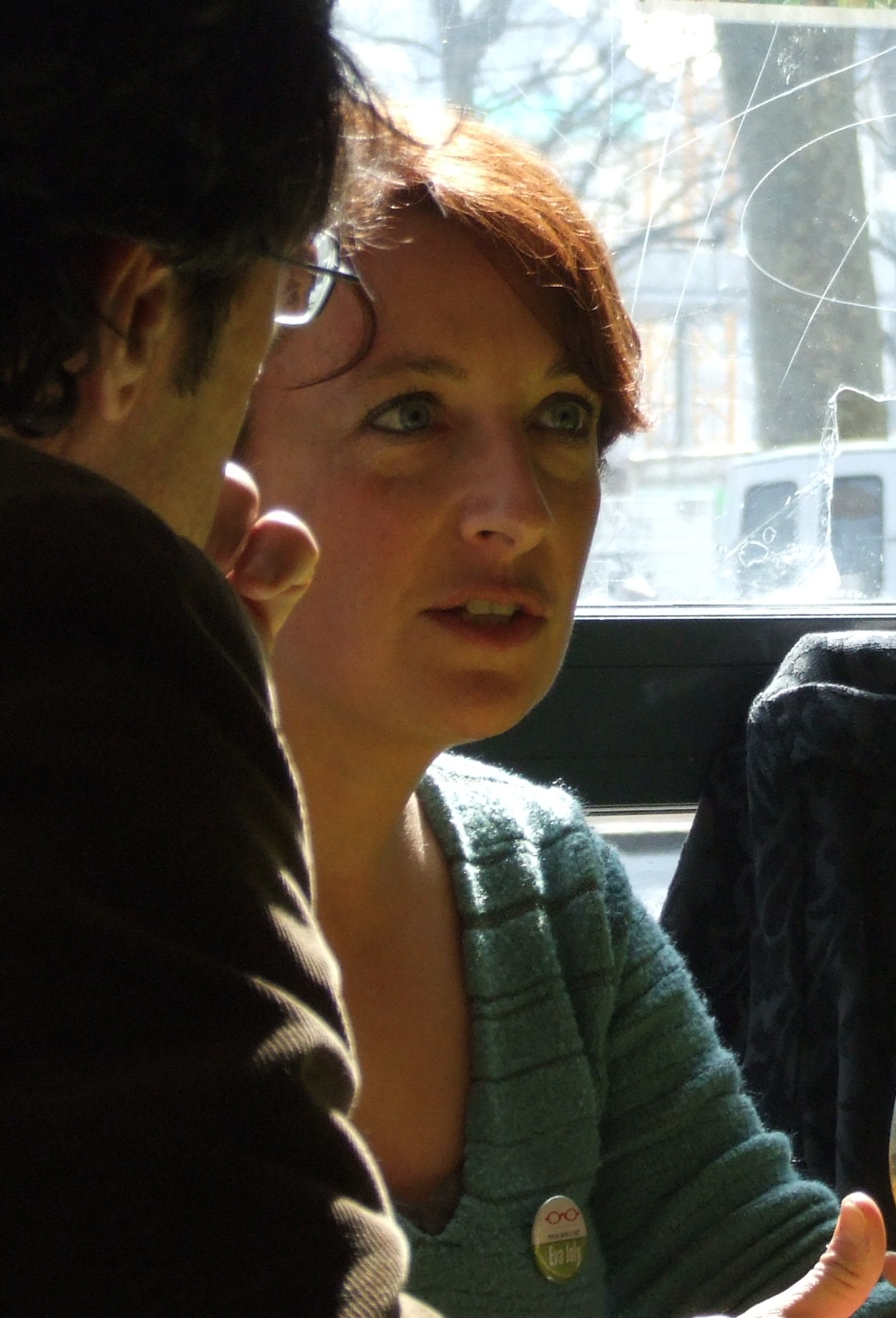 Isabelle Attard le 21 mars 2012 lors de la venue de Cécile Duflot à Bayeux.